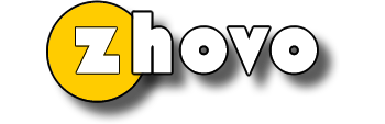 logo de